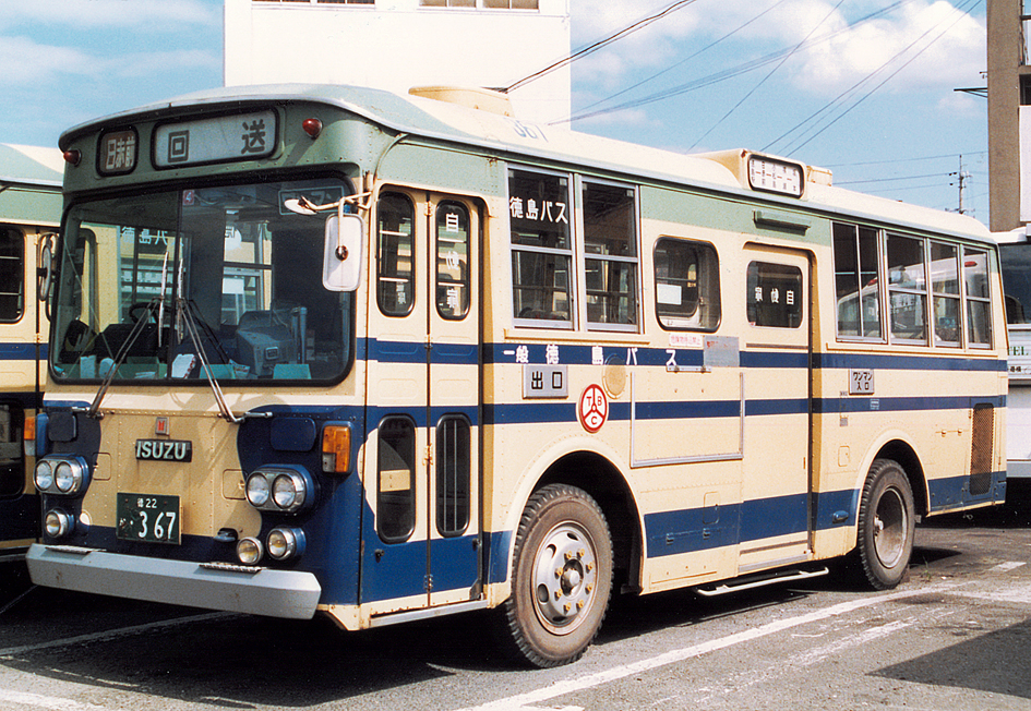 徳島バス いすゞBA05N